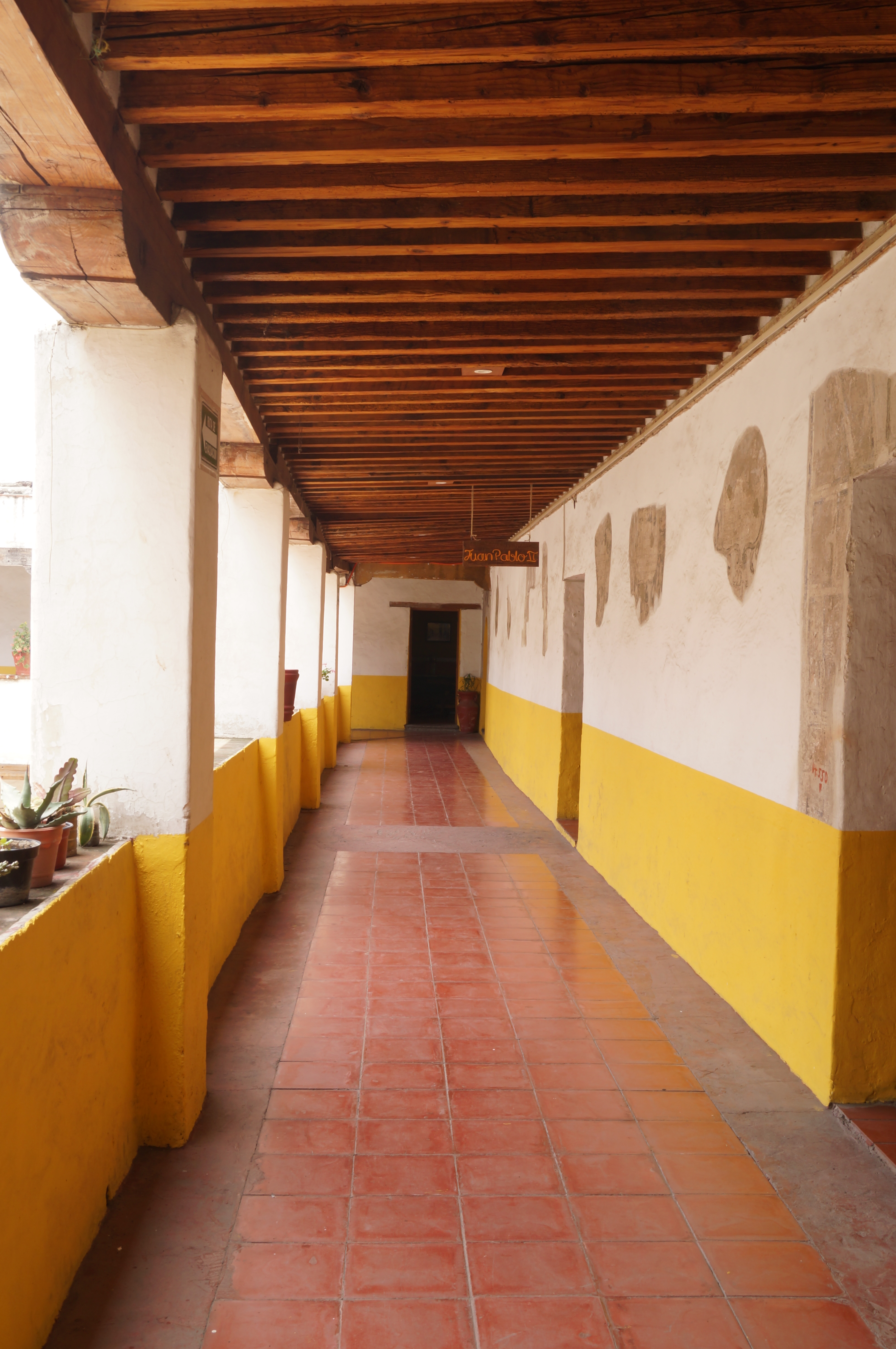 Templo y Antiguo Convento de San Matías Apóstol (Iztacalco)